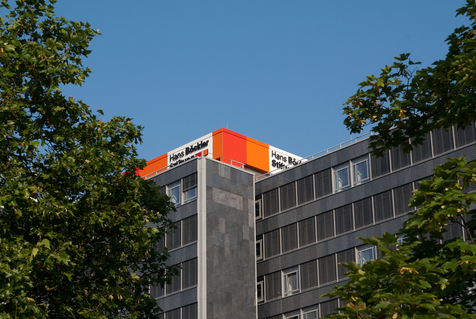 Zentrale der Hans-Böckler-Stiftung in Düsseldorf